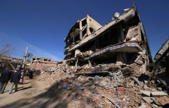 Cizre after operation